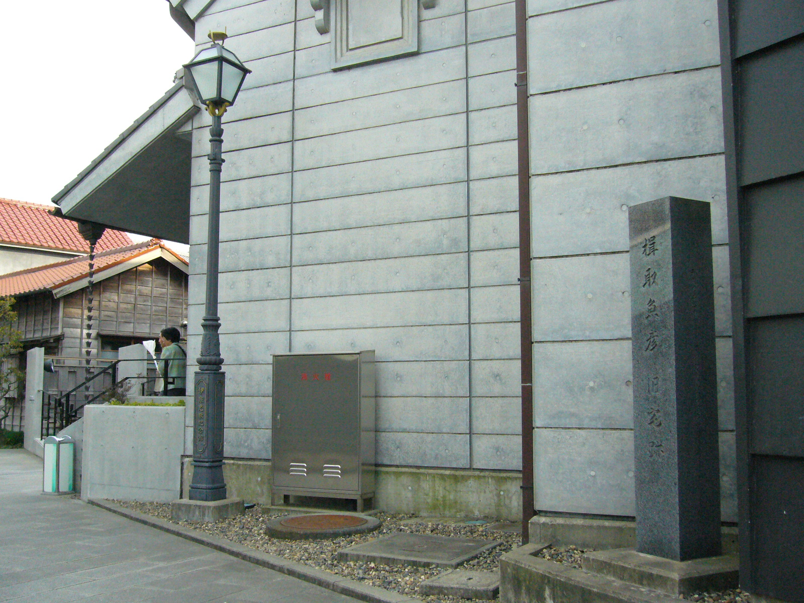 katori-nahiko-house,katori-city,japan